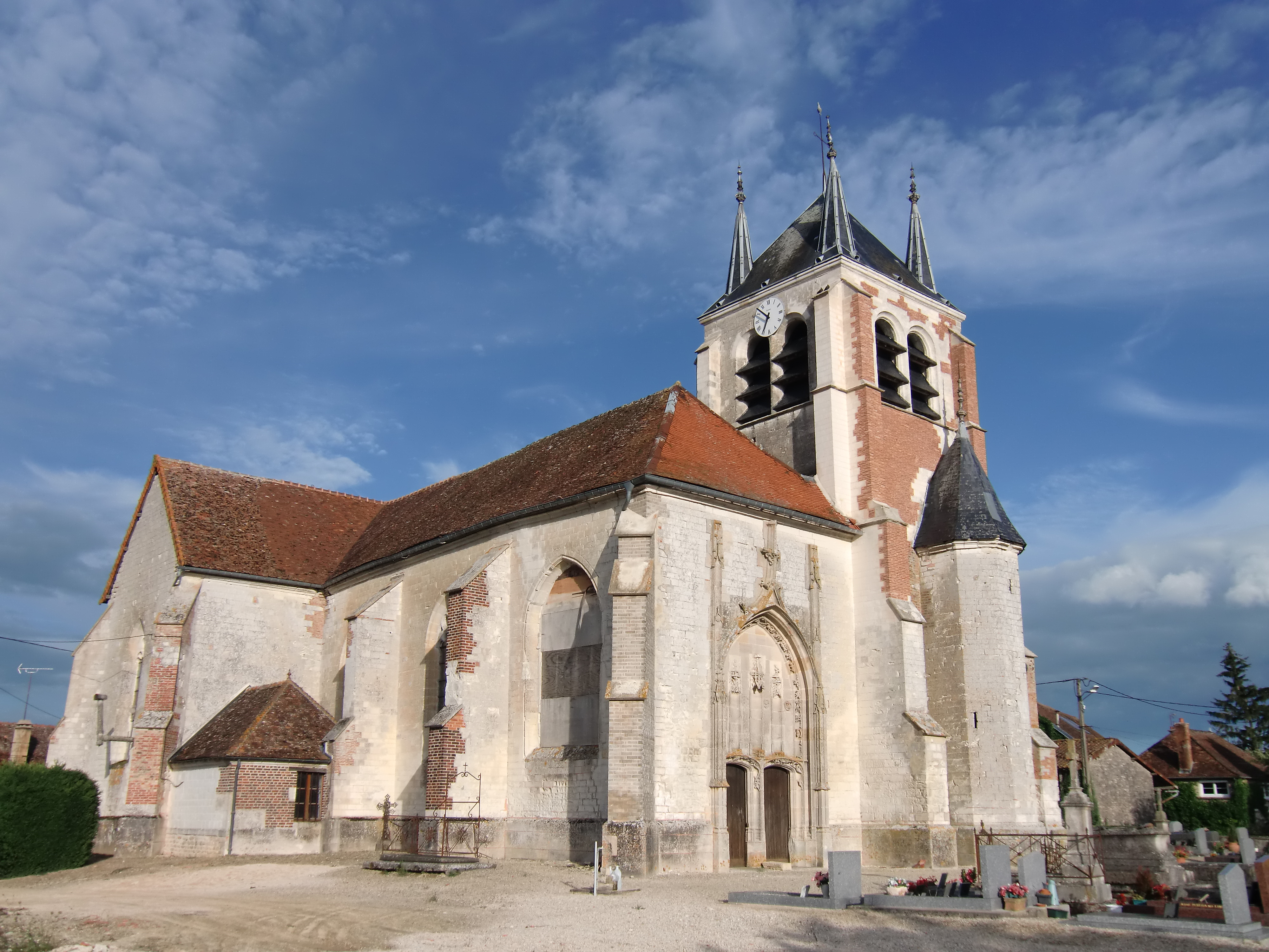 église Notre-Dame de l'Assomption de Pel-et-Der (Aube, Champagne, France)